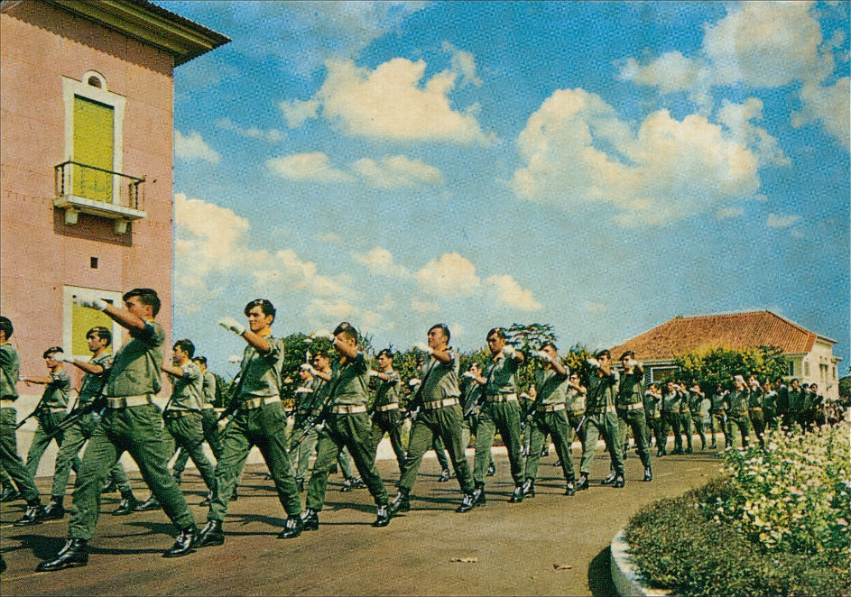 Postcard: Foto Iris No 07 - Render da Guarda - Palácio do Governo - Bissau